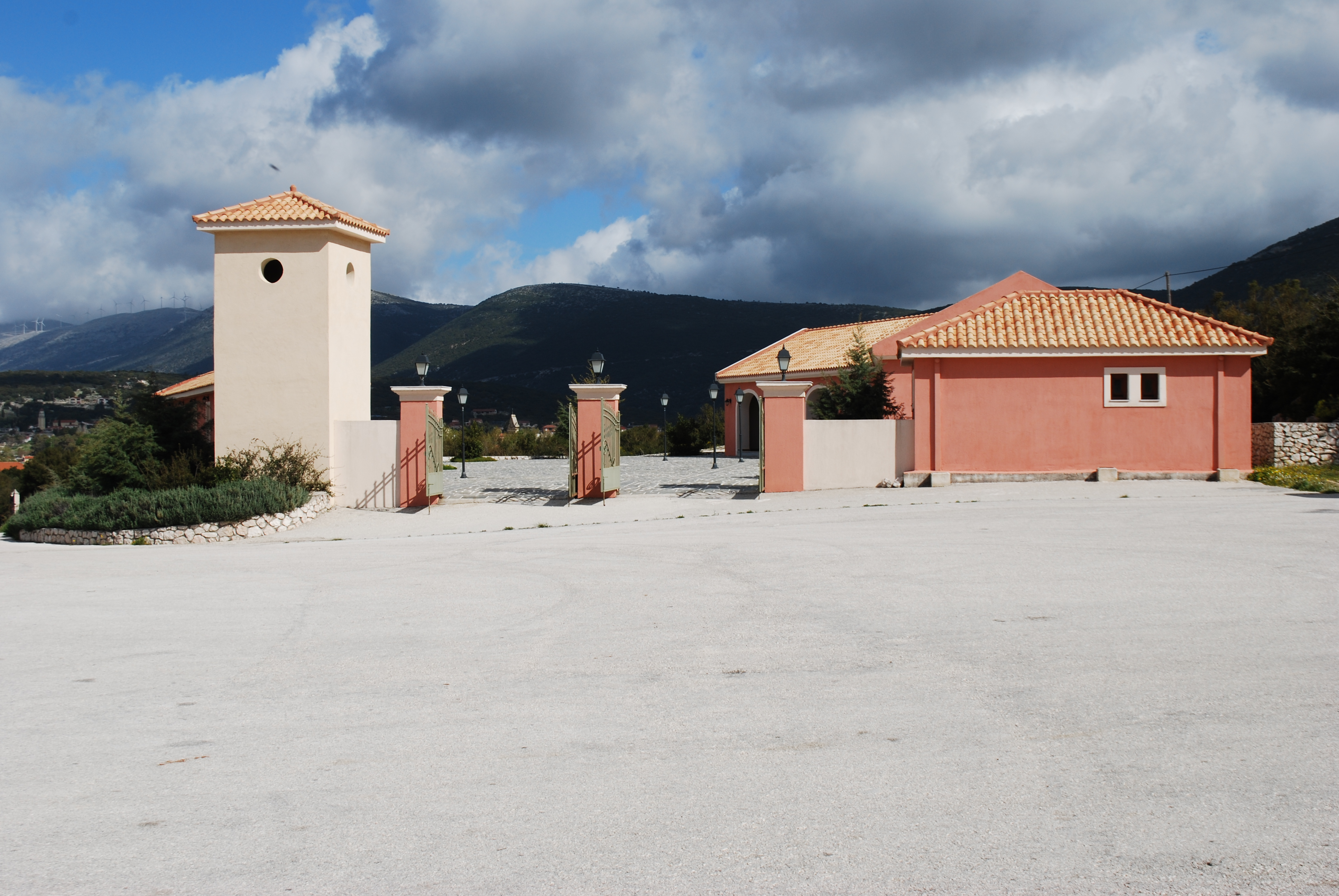 Vue de la coopérative viticole de Robola, à Kefalonia.